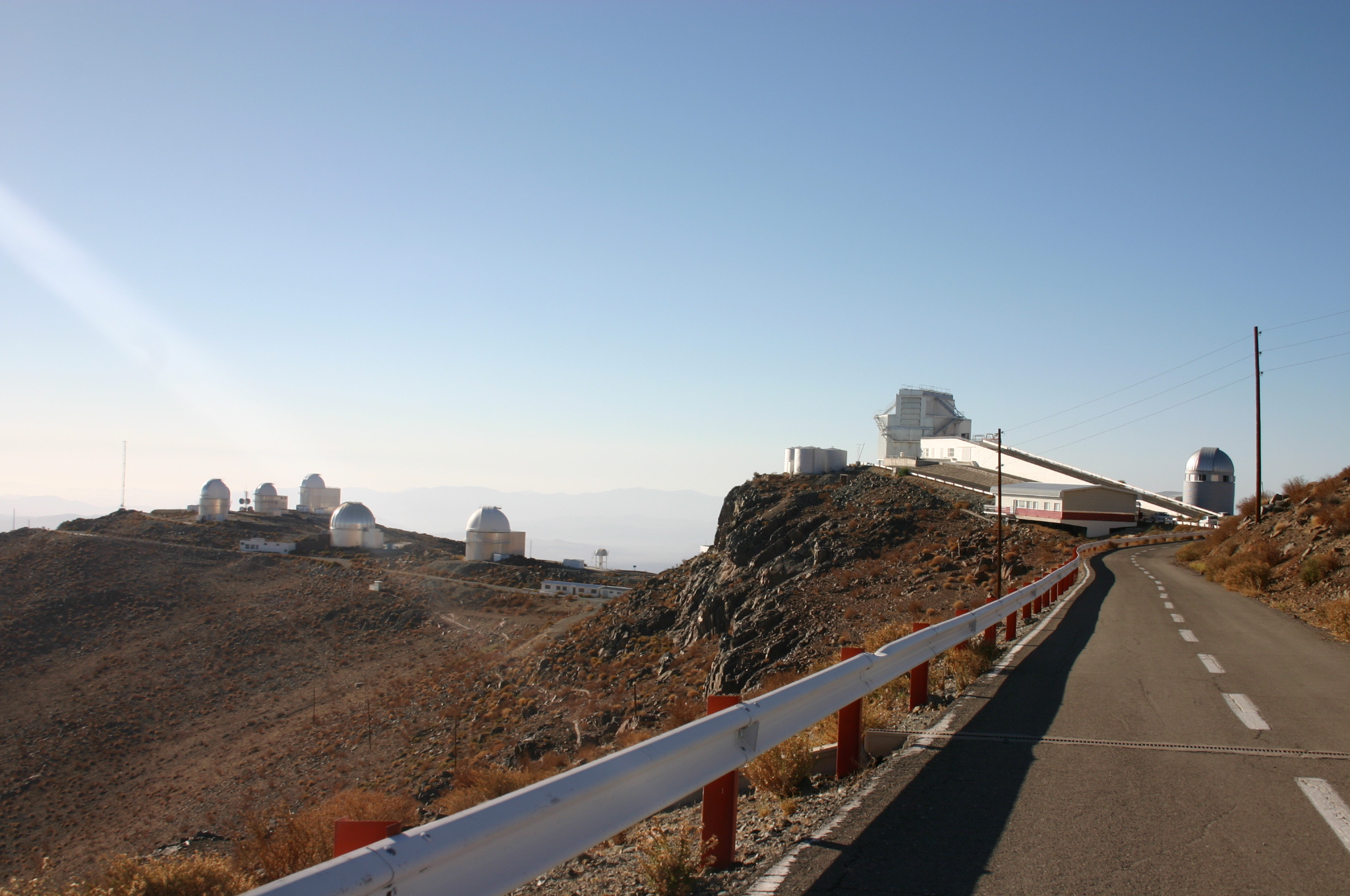 Vue de jour du site de La Silla, au Chili.